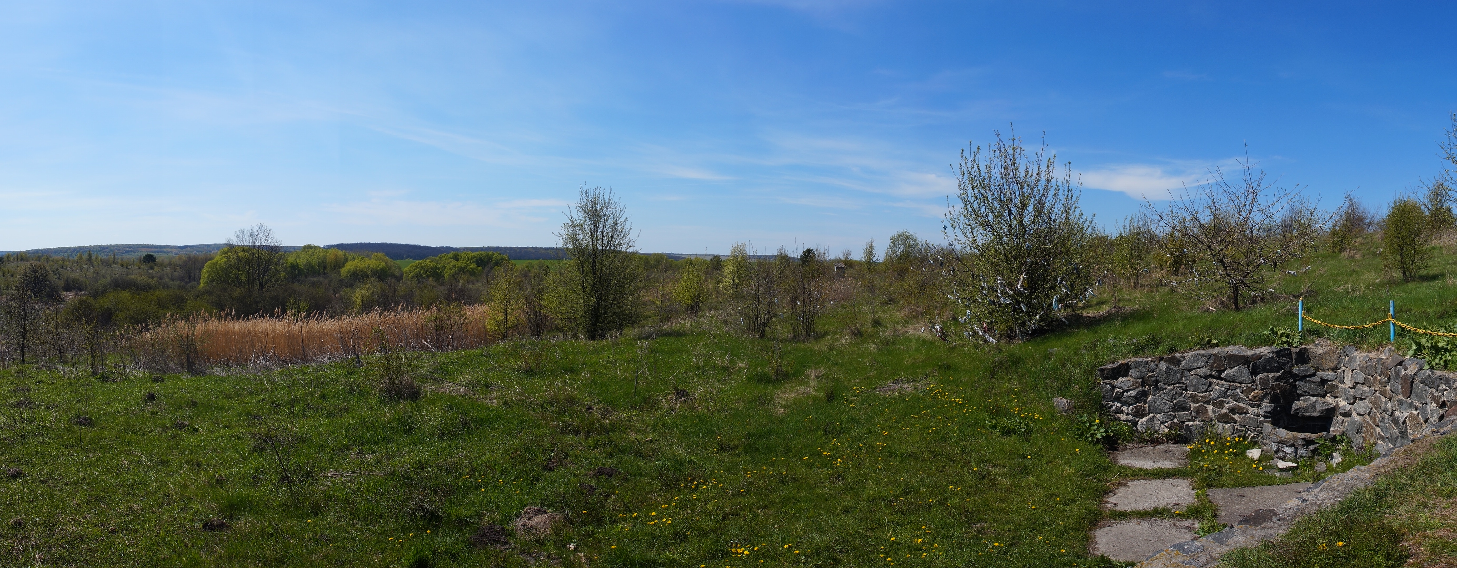 Чиста криничка, Деражнянський район, поблизу с. Слобідка Шелехівська